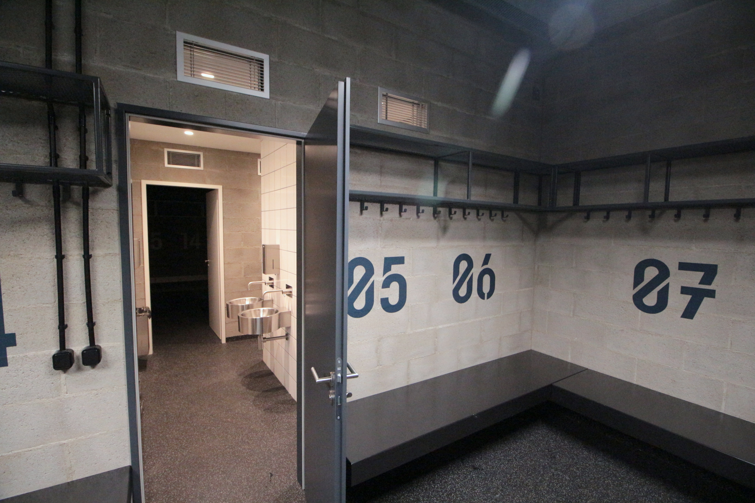 Škoda IceRink Praha